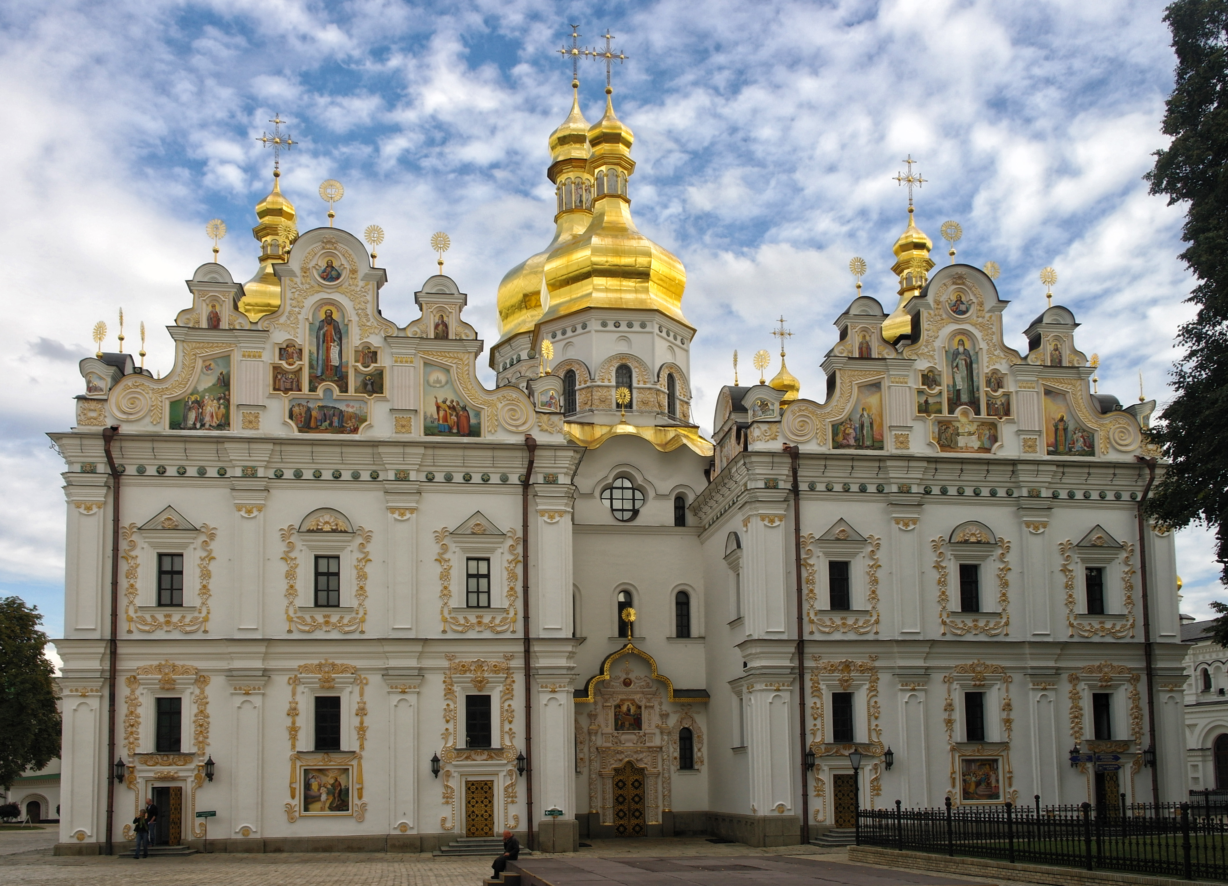 Київ, Києво-Печерська Лавра